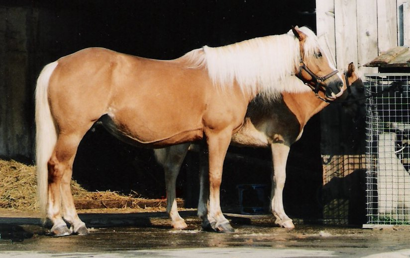 Preisgekrönte Haflinger-Zuchtstute "Atara" mit Fohlen, Schweizer Zucht (E. Peyer, Ifenthal/Hauenstein)